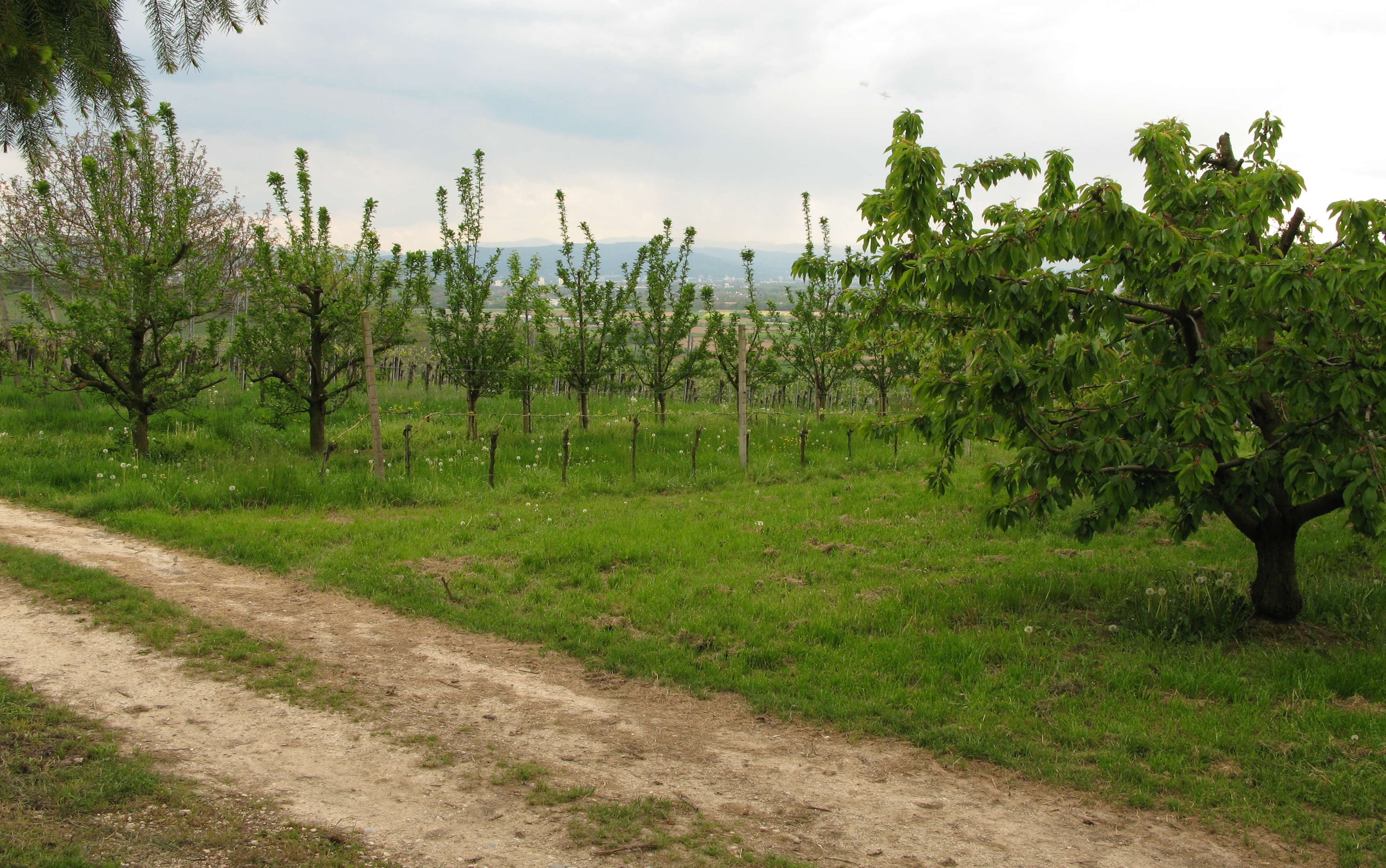 Blick von der Fischerhütte am Läufelberg auf Basel bei Fischingen am Fernwanderweg Markgräfler Wiiwegli im Markgräflerland.